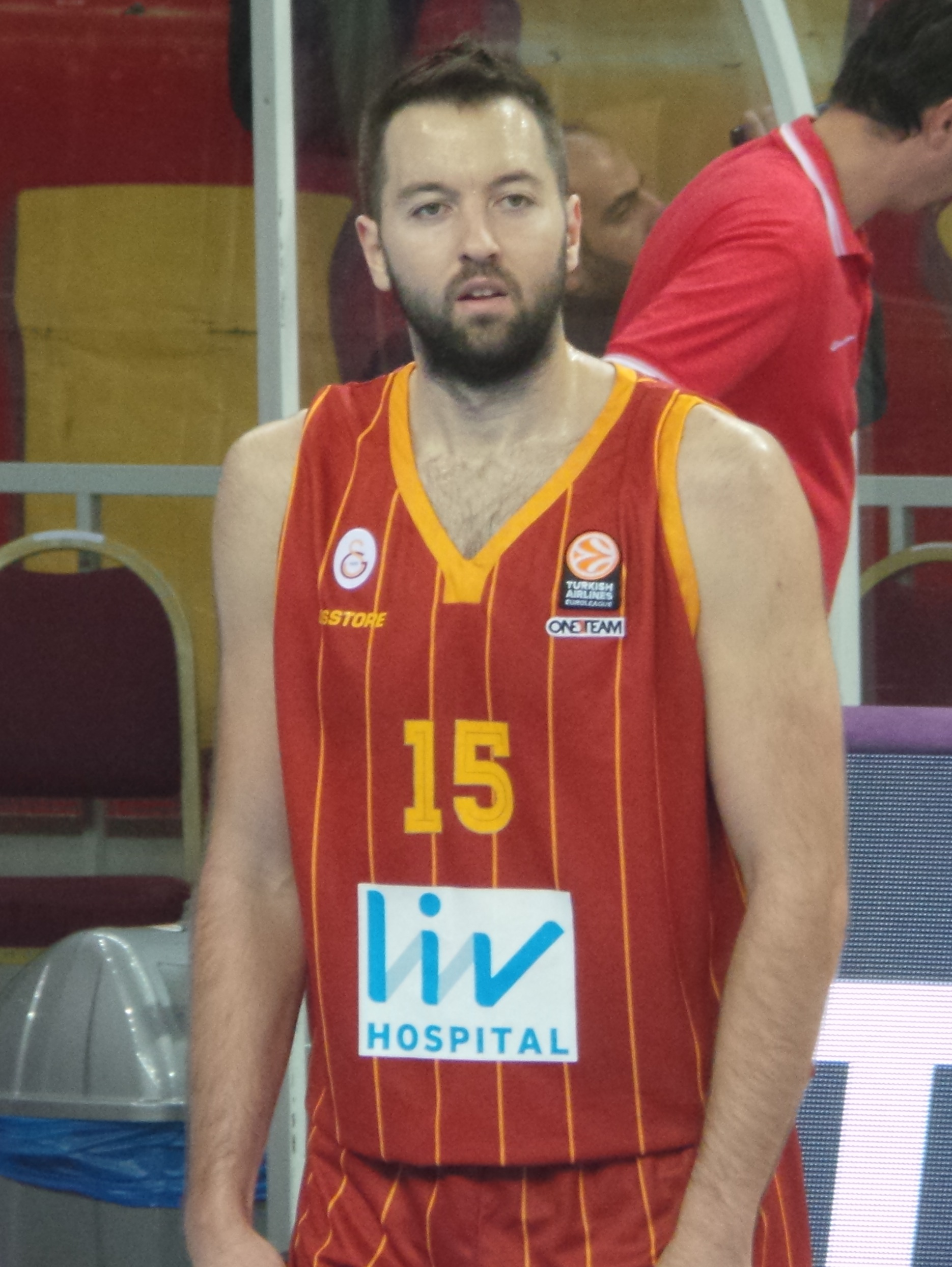 Ian Vougioukas